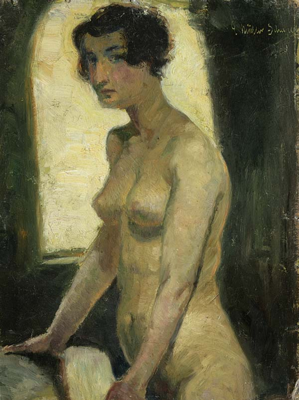 Stehender weiblicher Akt. Öl auf Karton, signiert, 32 x 24 cm